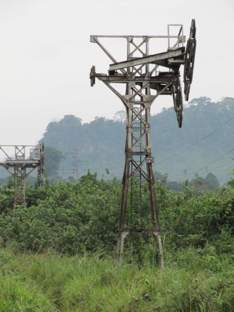 Pylone de l'ancienne télébenne à Moanda, Gabon